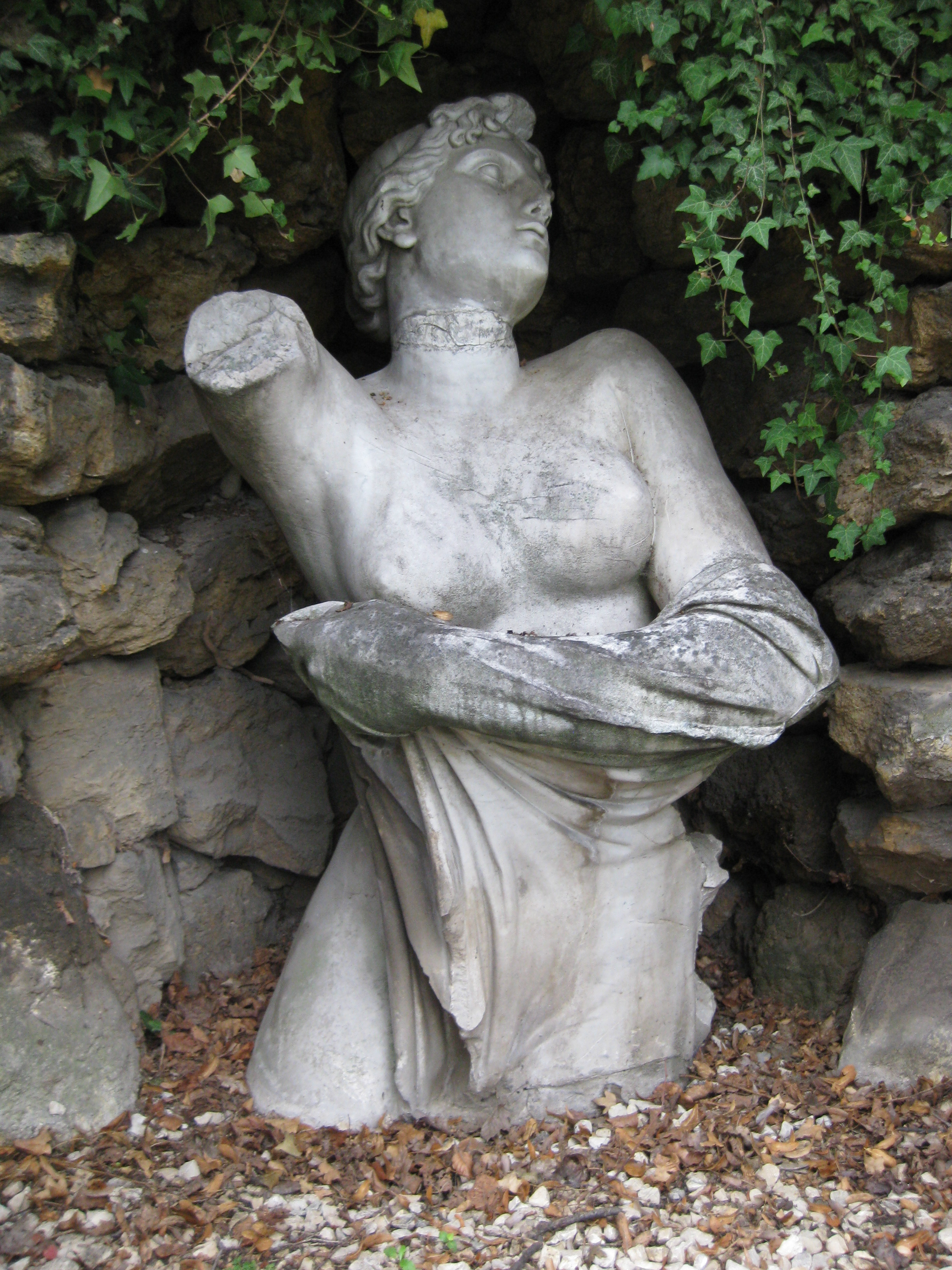 Johann Heinrich Dannecker: Wasser- und Wiesennymphe, Torso der Wiesennymphe. Kopie von Adolf Fremd (1922) in Marmor, Stuttgart, Städtisches Lapidarium